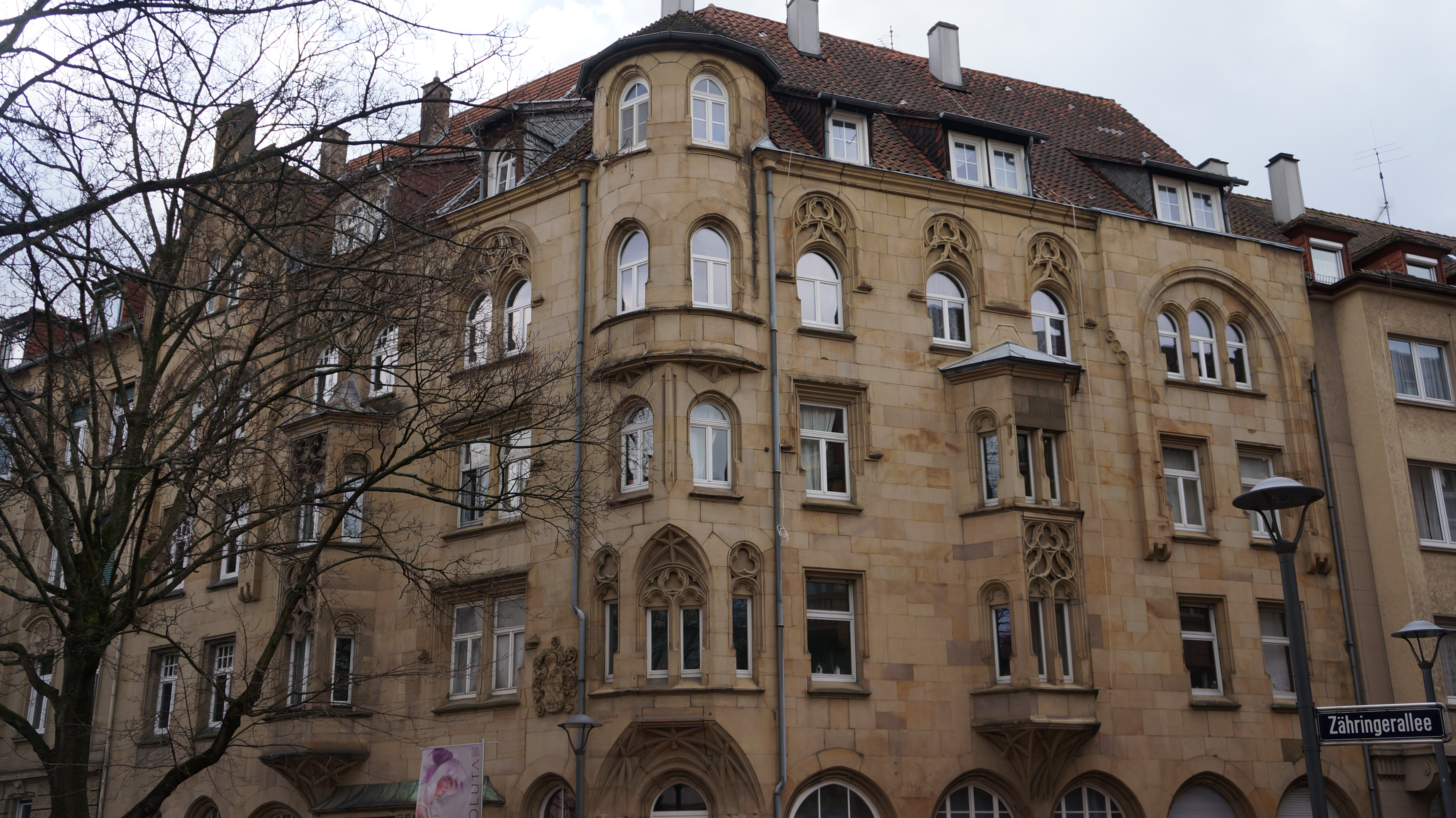 Freilich ein Relikt des vormals weiträumig angewandten Jugendstils.